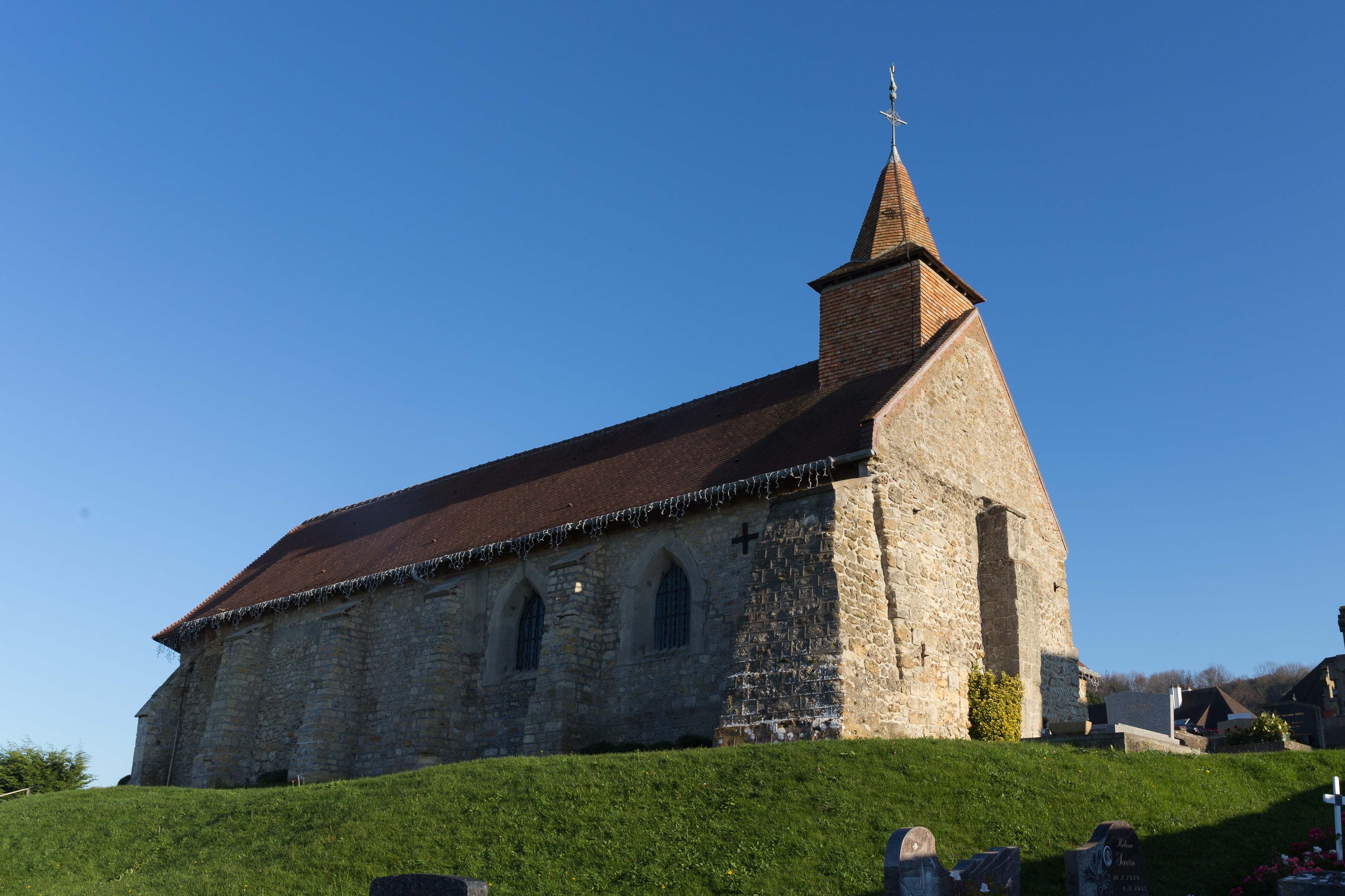 Église Saint-Christophe de Benerville-sur-Mer